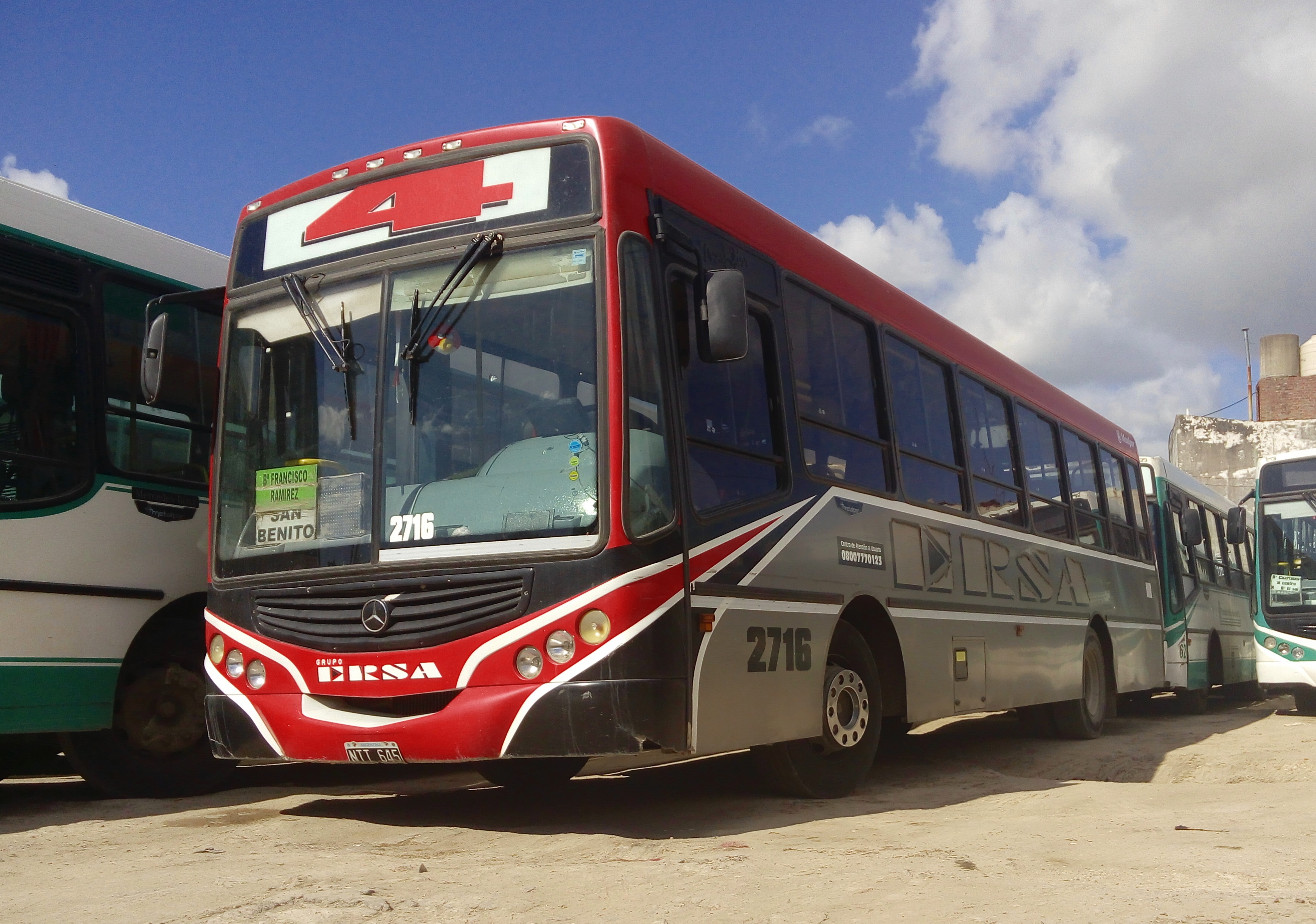 Interno 2716 de línea 4 de la empresa ERSA Urbano de la ciudad de Paraná